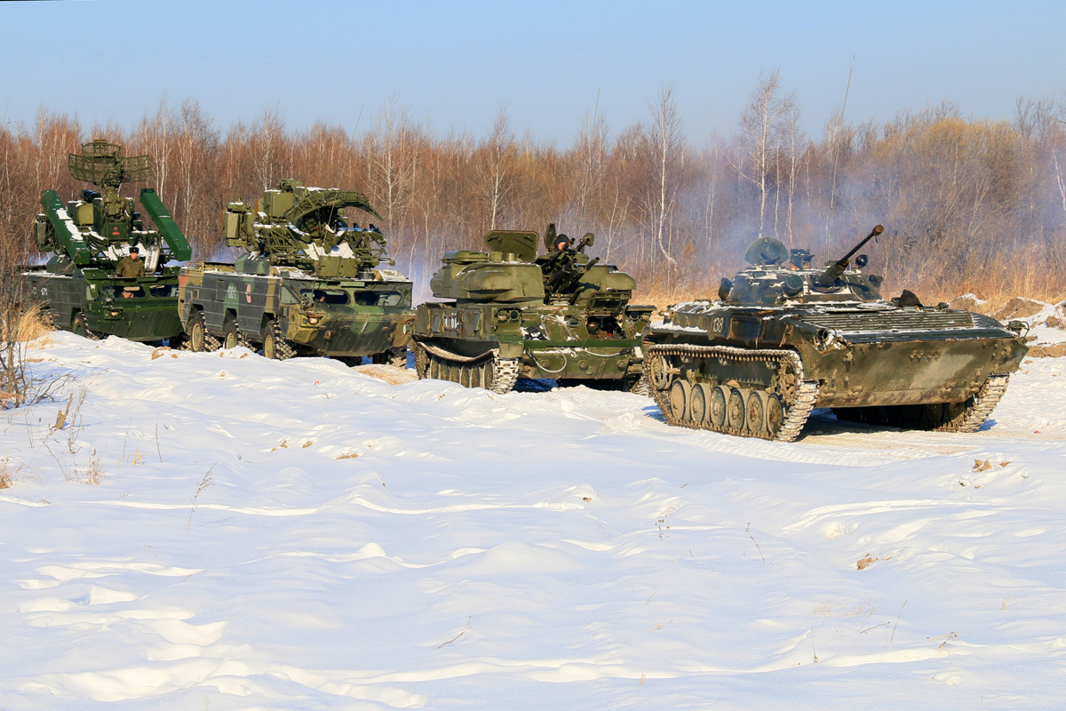 Учение с зенитными подразделениями Восточного военного округа (полигон Князе-Волконский, Хабаровский край)